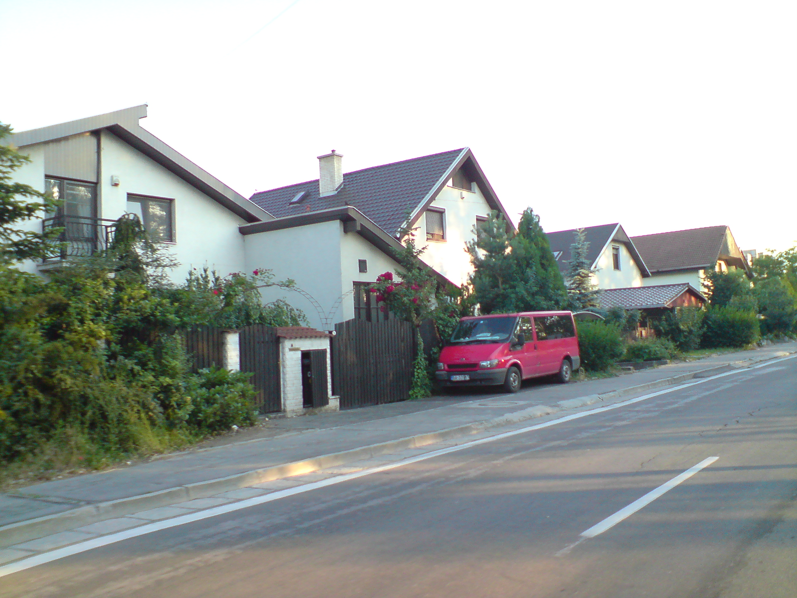 Podunajská, Vrakuňa, Bratislava